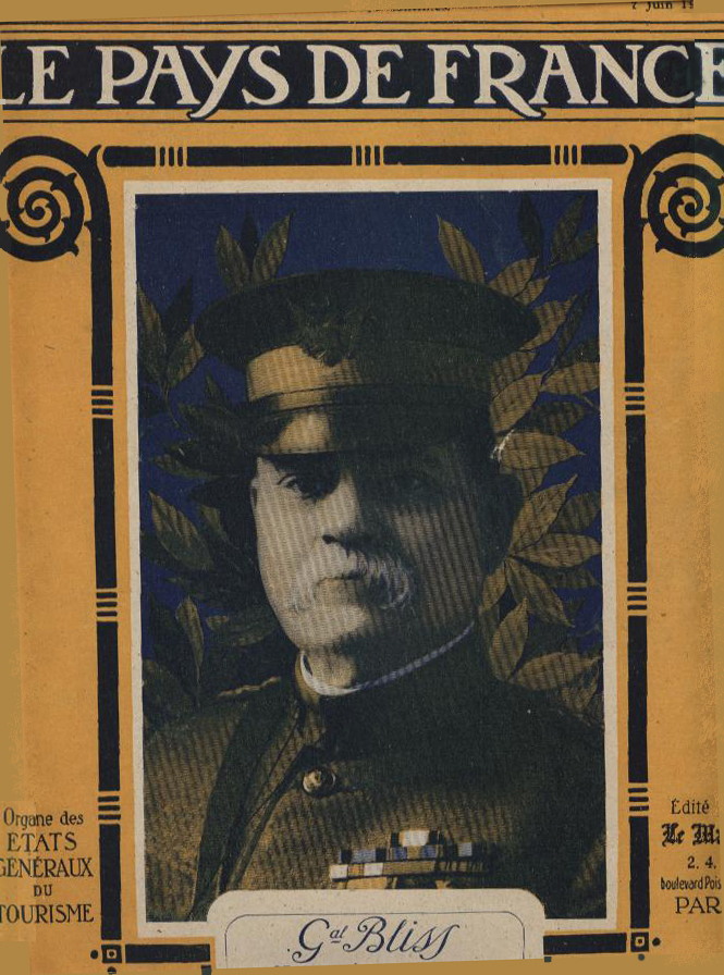 Portrait en couverture de Le Pays de France, magasine n°242 du général américain Tasker H. Bliss.